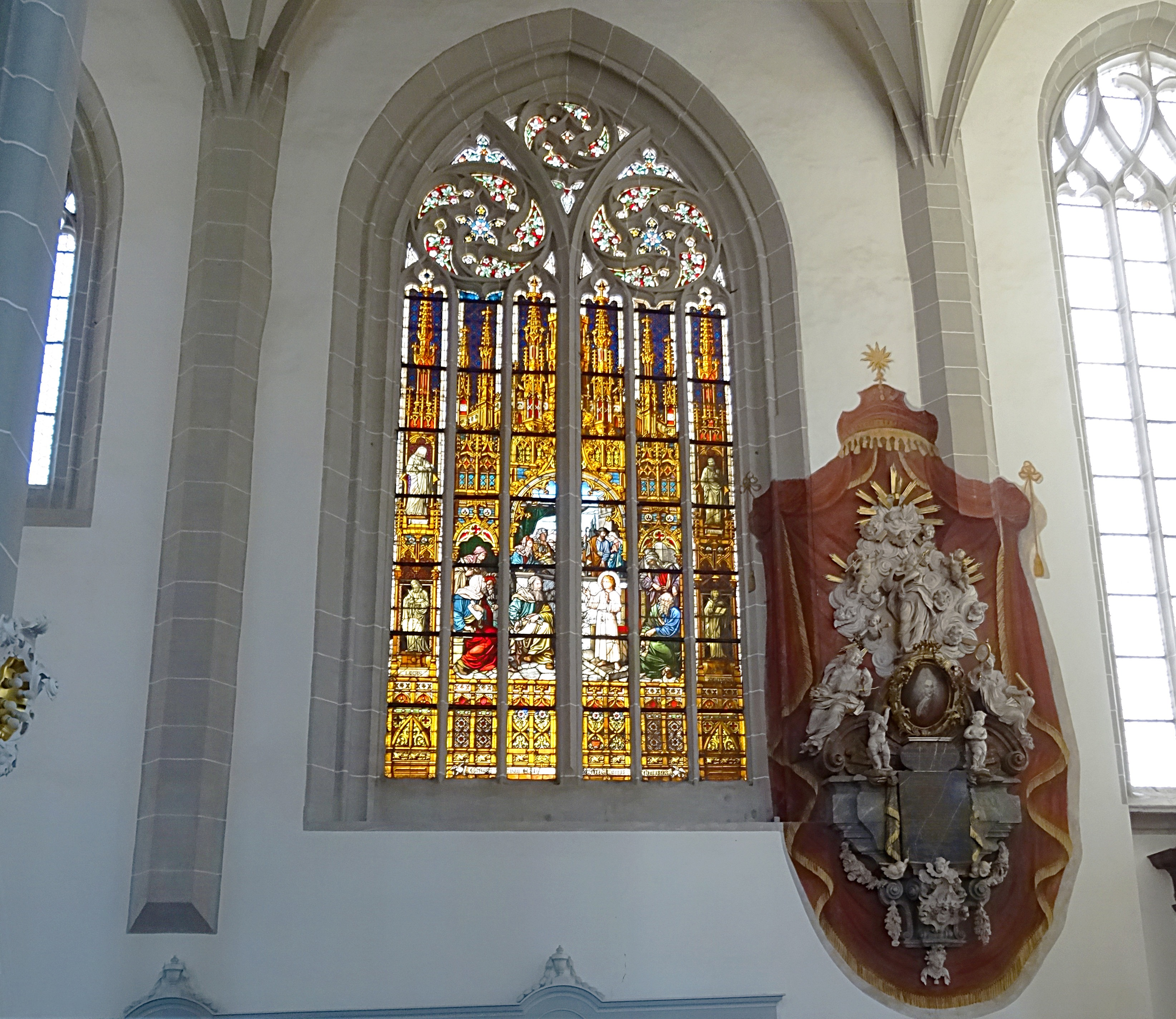 Glasgemälde mit Jesus im Tempel in der Stadtkirche St. Peter und Paul (Görlitz)